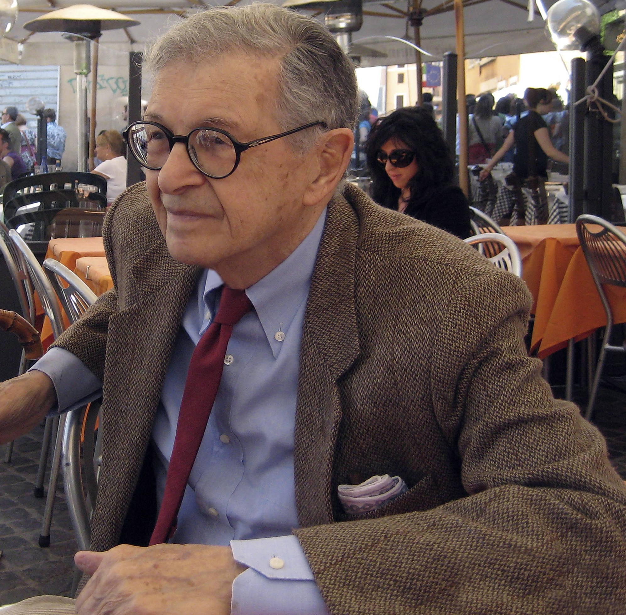 sceneggiatore, disegnatore, giornalista, e scrittore italiano